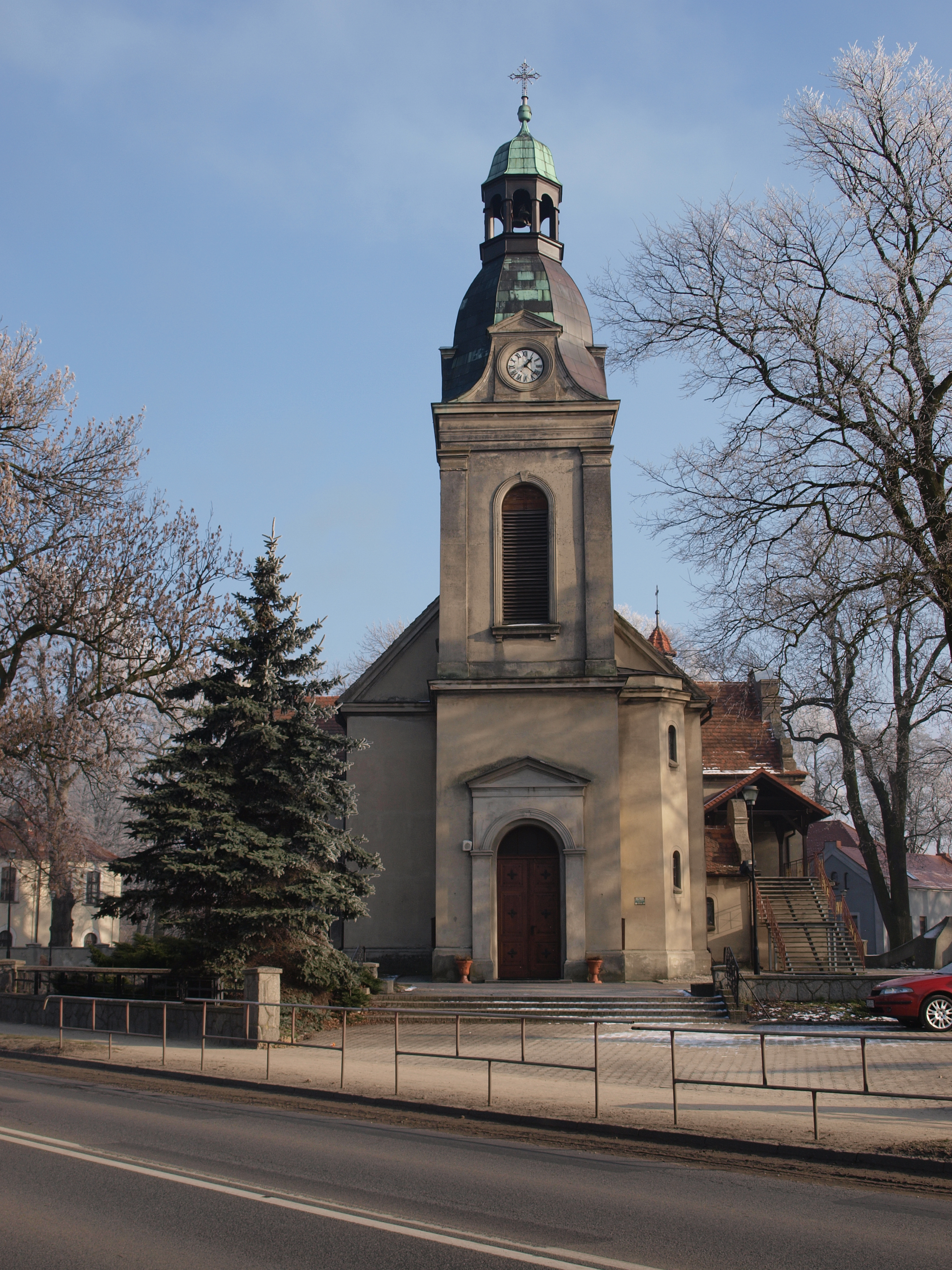 Kościół przy kaplicy św.Katarzyny w Skalmierzycach widok z ulicy. IV-73/69/73.